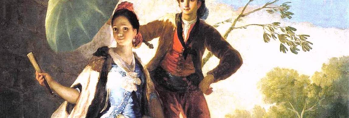 detail